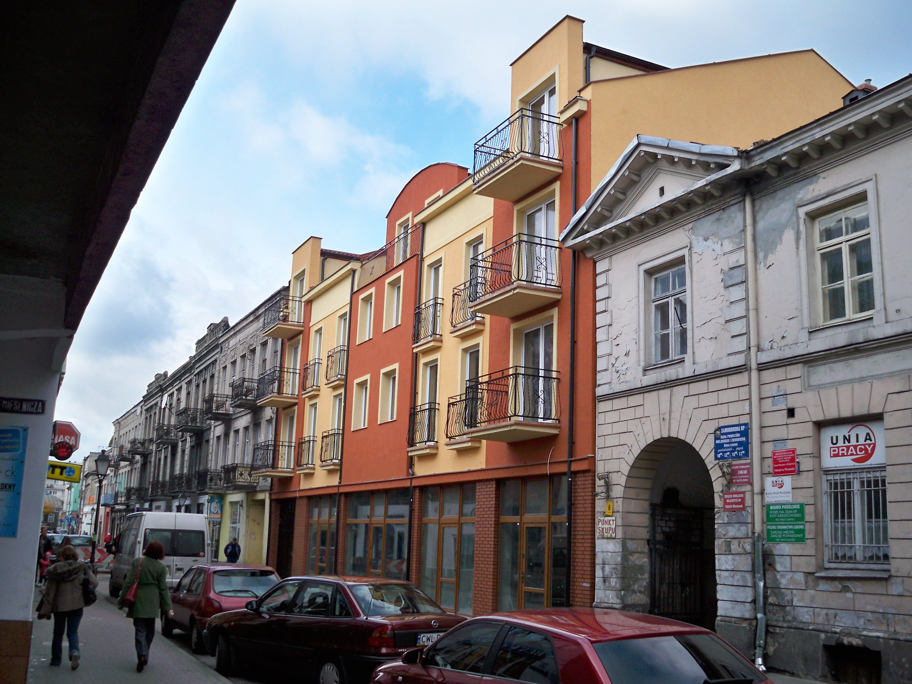 Wybudowany nowy budynek przy ul. Piekarskiej 6 (2009 r.) we Włocławku